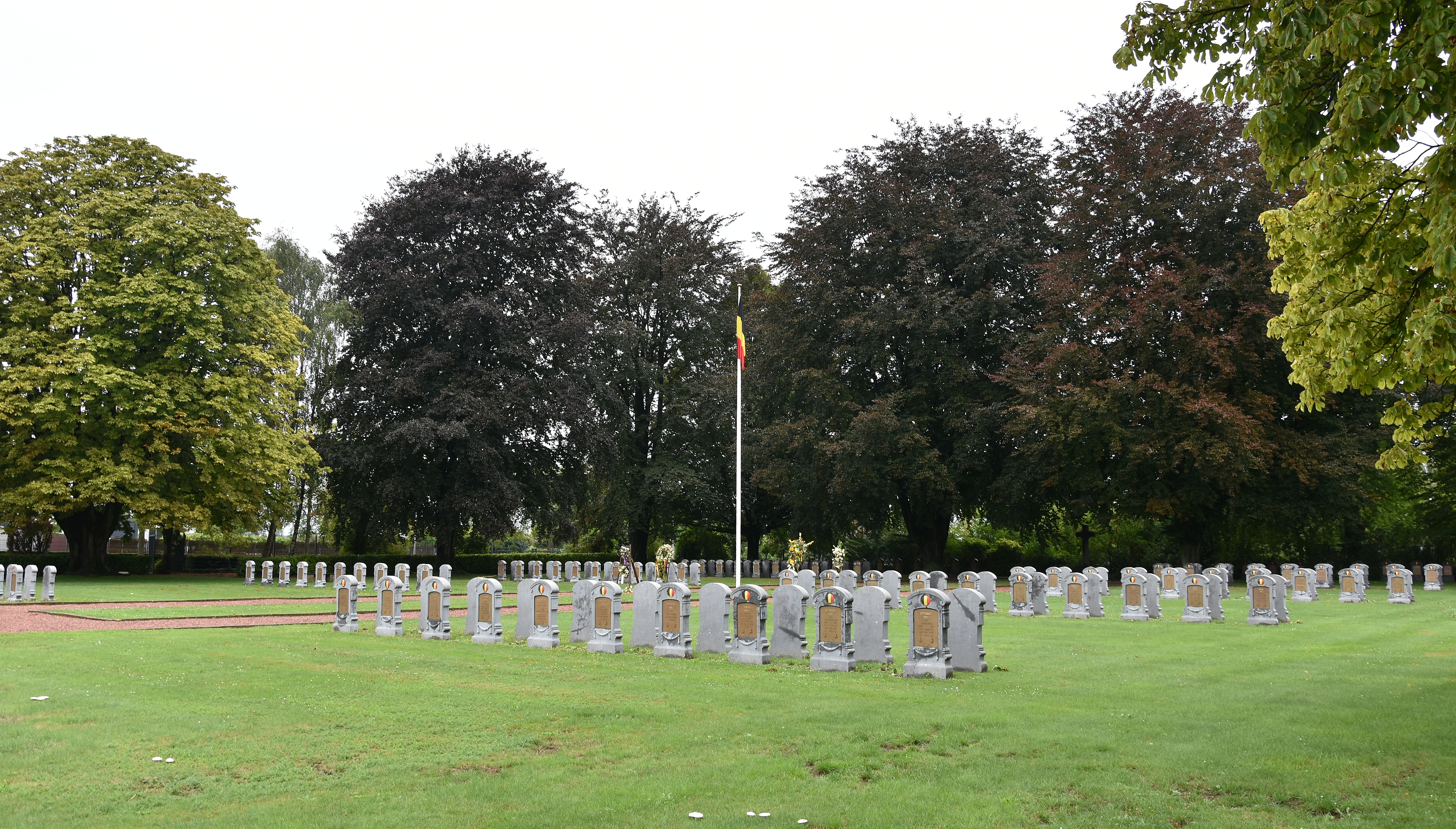 Belgische militaire begraafplaats (Halen) (2724) 18-08-2019 13-23-14 This photo of immovable heritage has been taken in the Flemish Region